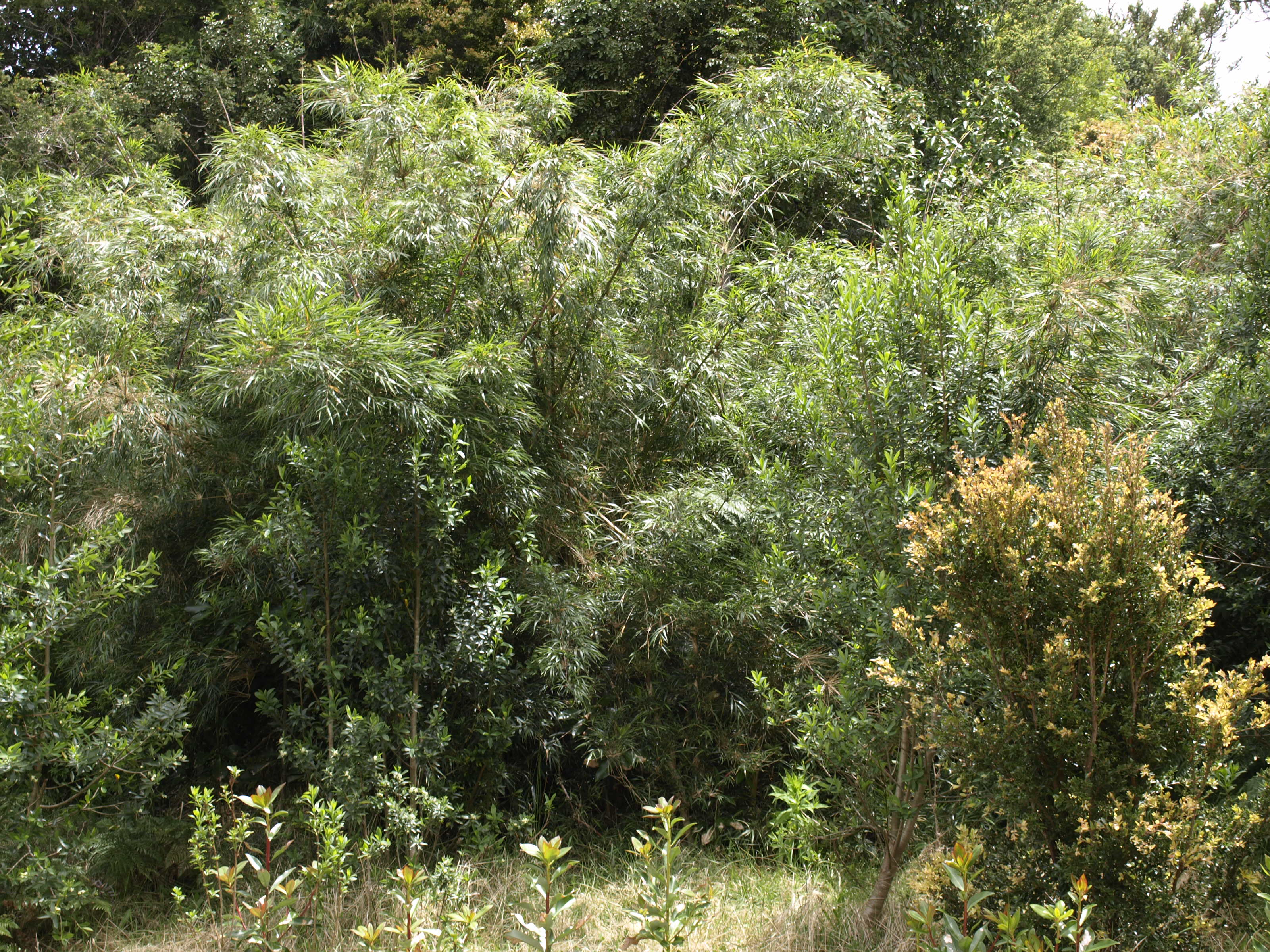 Chusquea valdiviensis, Parque Nacional Oncol, Chile